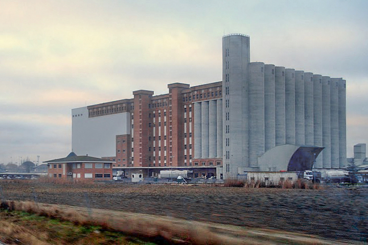 fotogracia de la fabrica de harinas en Arévalo